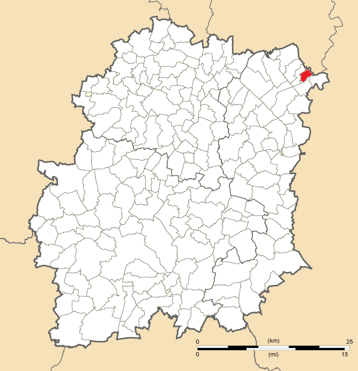 Carte de position de Boussy-Saint-Antoine en Essonne (91)